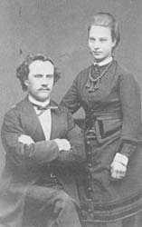 Kantor Johan Wilhelm Nessler och hans hustru Mathilda, född Westerstråhle.